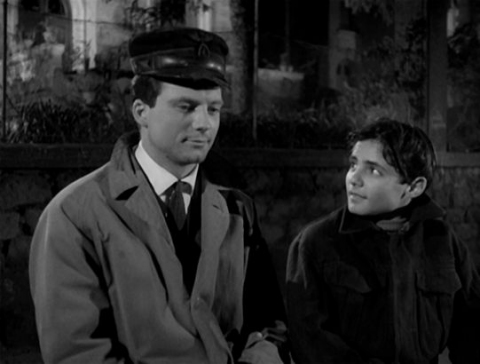 Screenshot del film I vitelloni (1953)